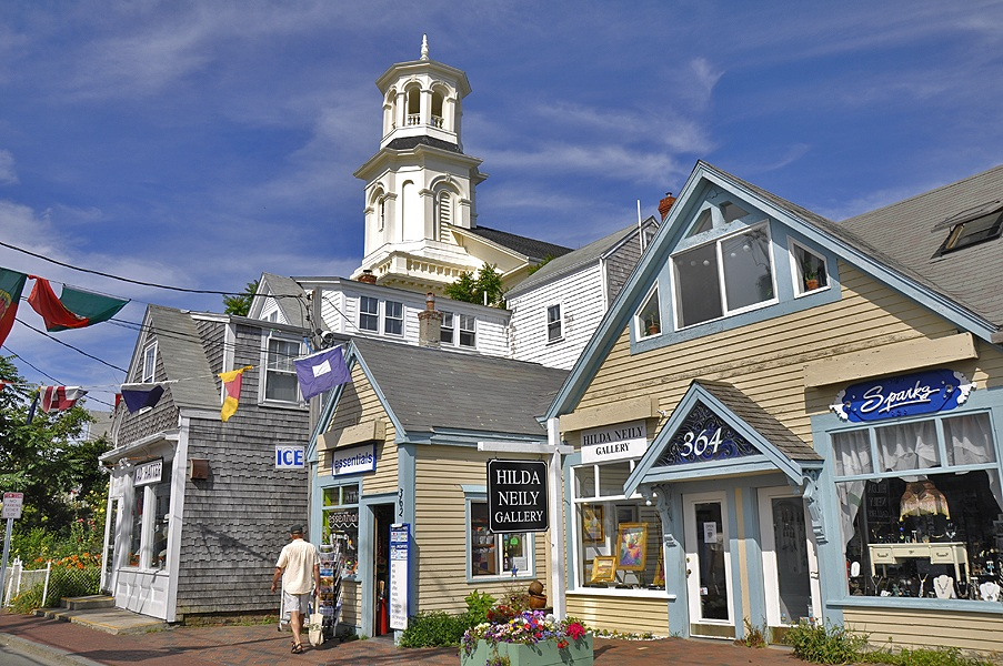 Commercial Street, Provincetown